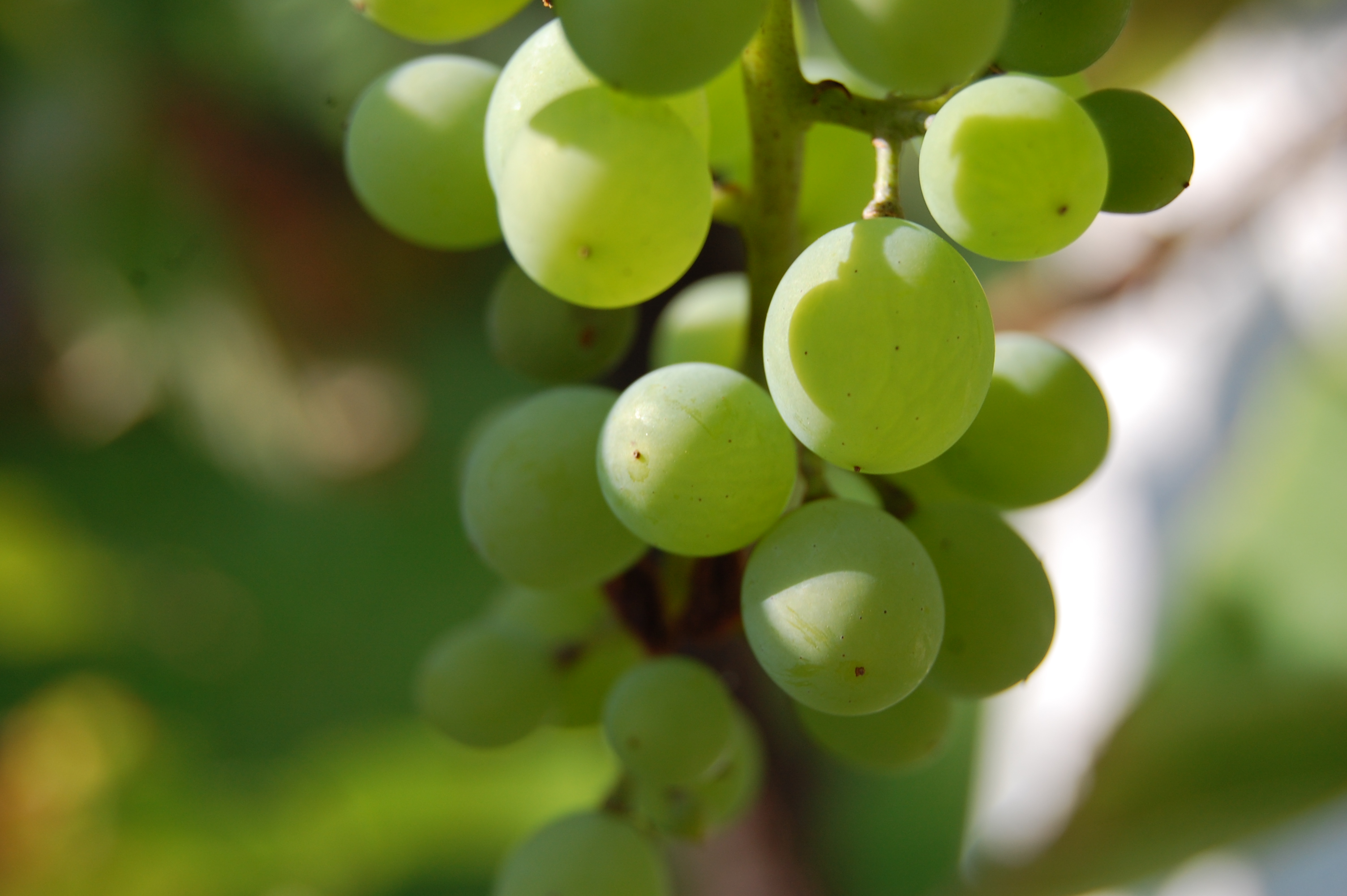 Weisse Weintrauben, Nahaufnahme